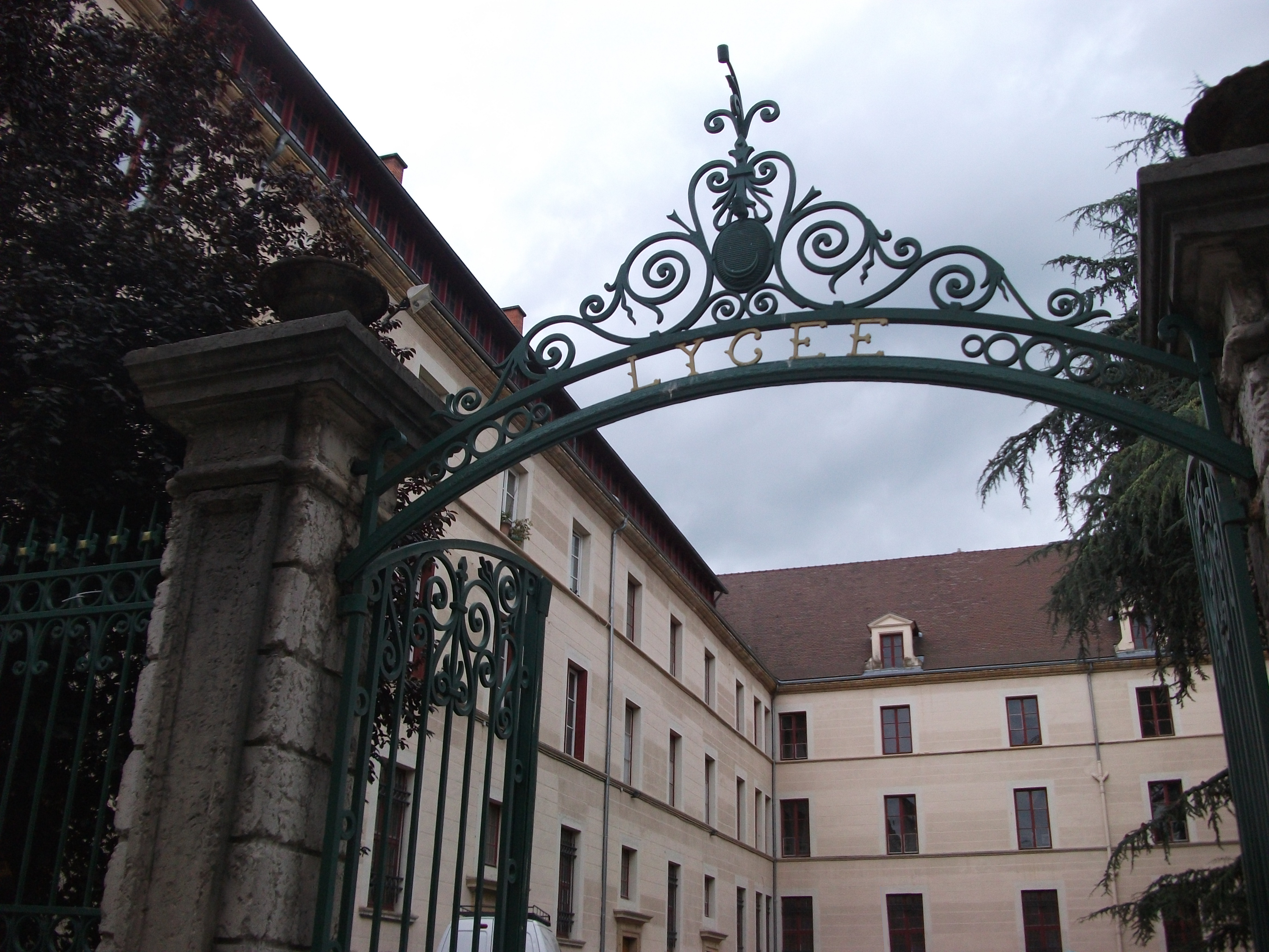 Lycée Jean-Puy, Rue Jean-Puy (Inscrit, 1942) .